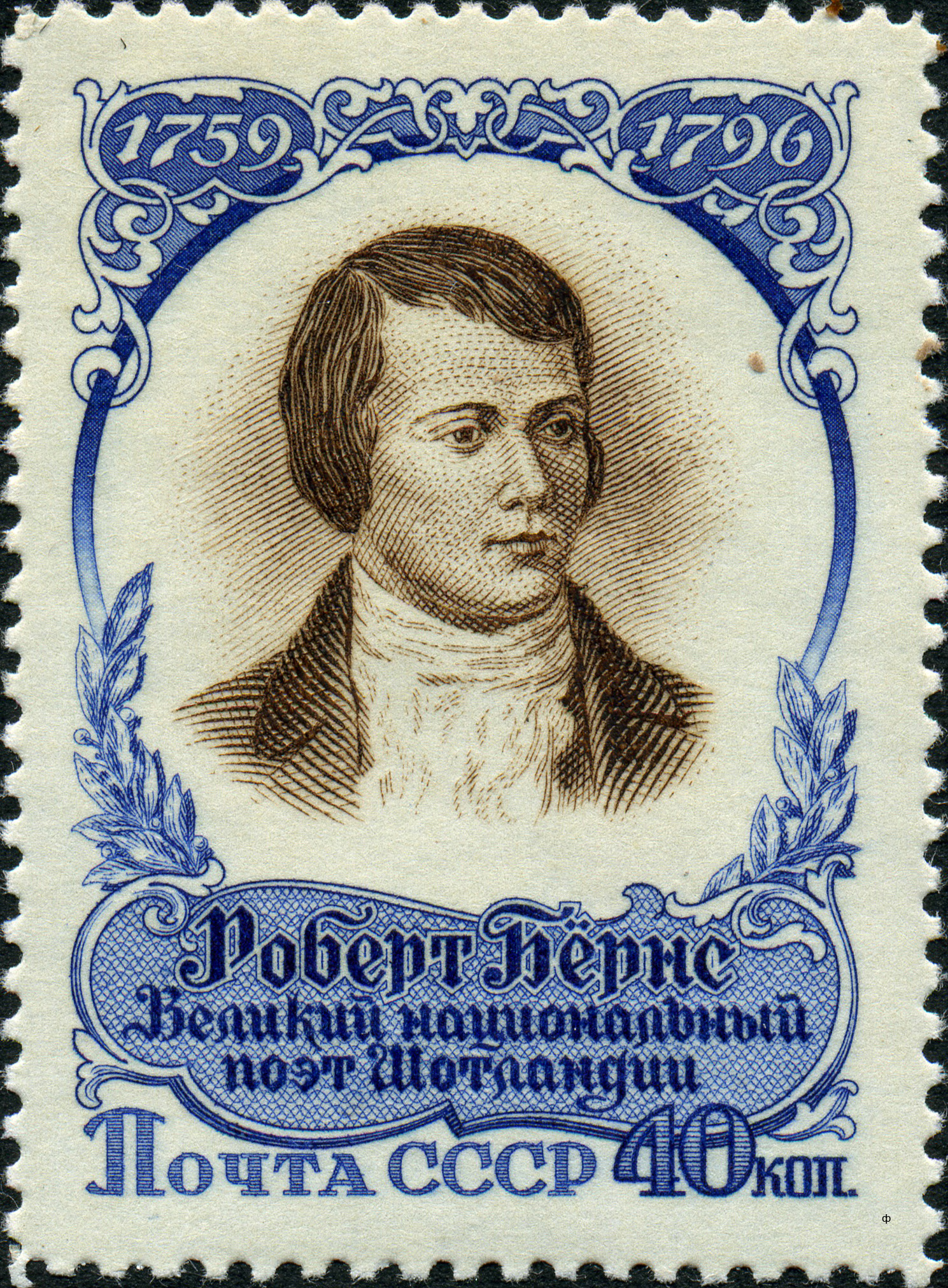 Марка СССР